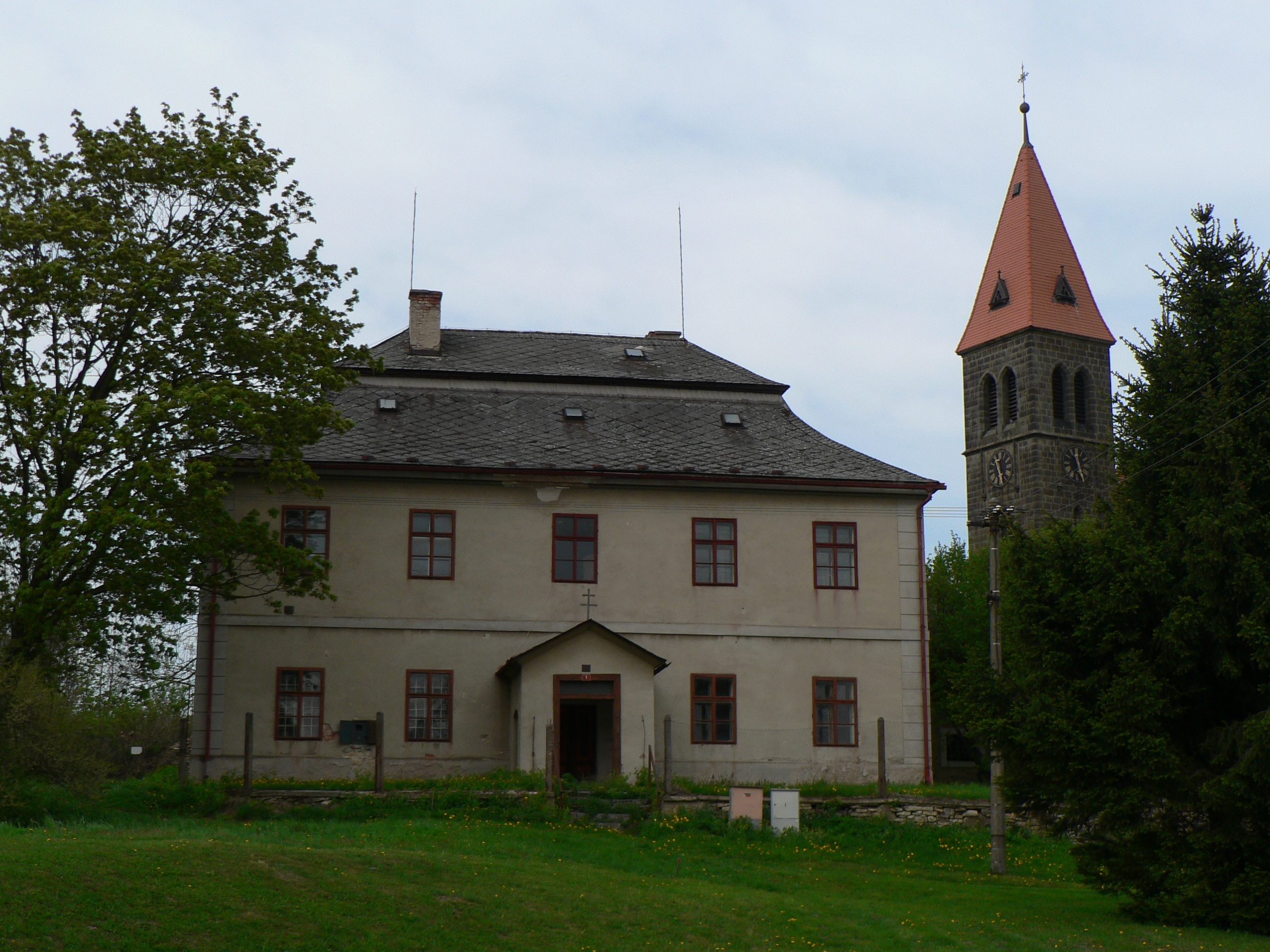 Barokní fara z roku 1754 a věž novogotického kostela v Damníkově.